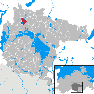 Neu Gaarz in Mecklenburg-Western Pomerania - District Müritz